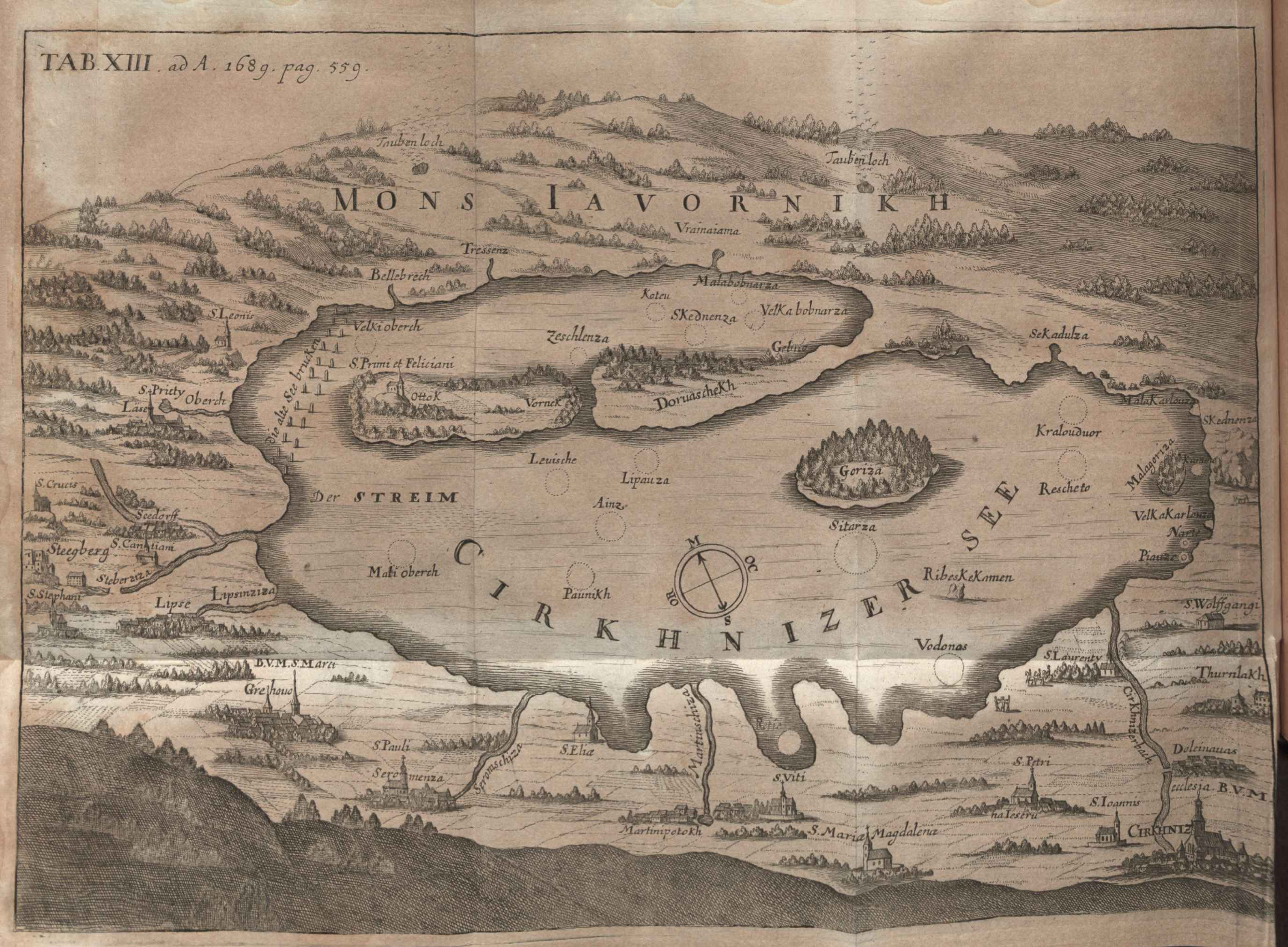 Illustration